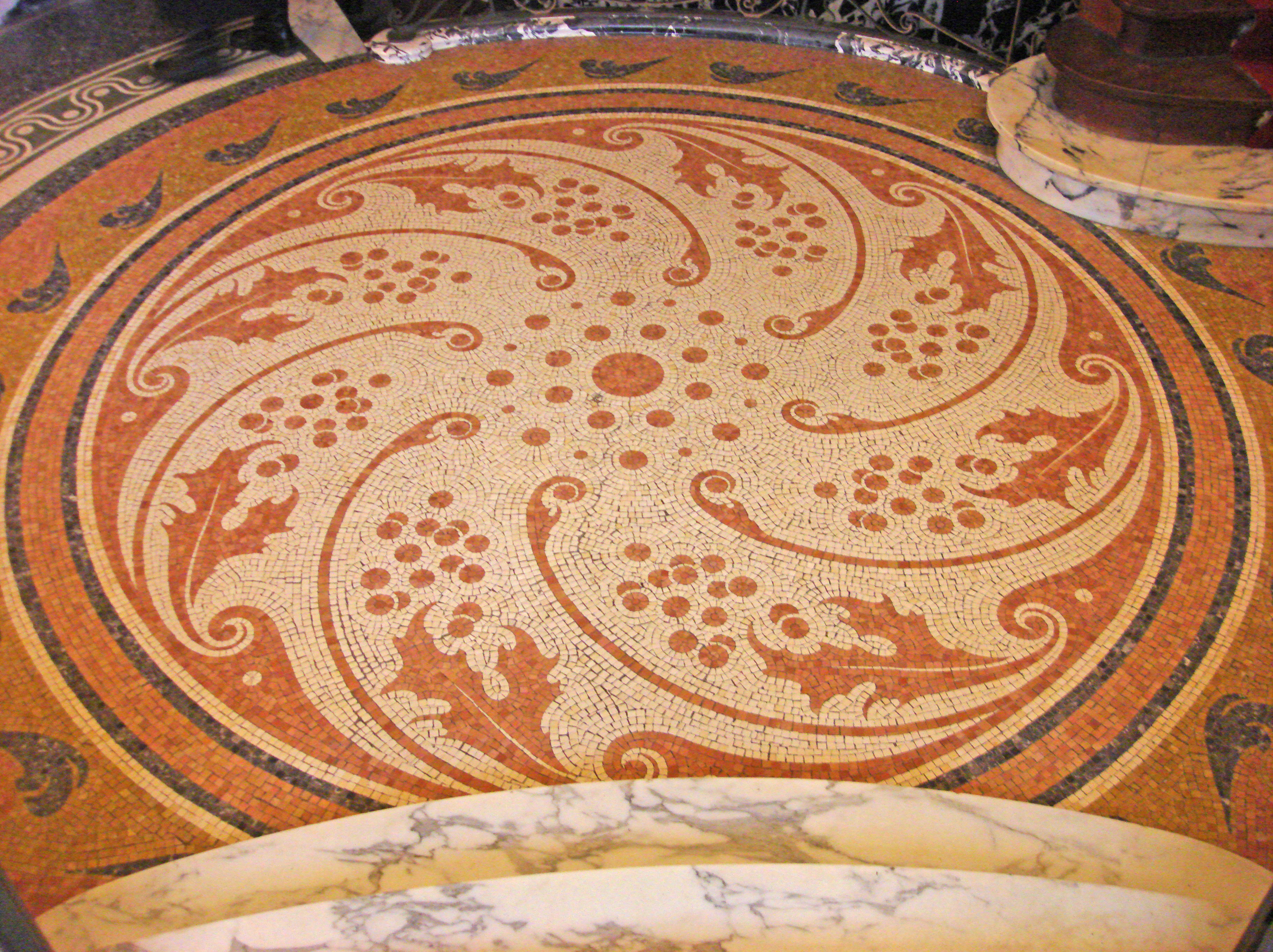 Hotel Hannon, Brussels